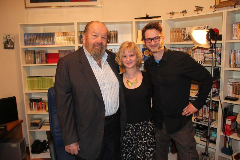 Bud Spencer mit Nörenberg und Pold am 16. Mai 2011